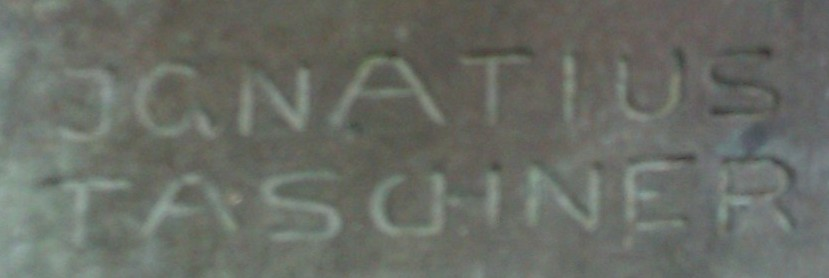 Signatur von Ignatius Taschner am Schleiden-Denkmal im Botanischen Garten Jena